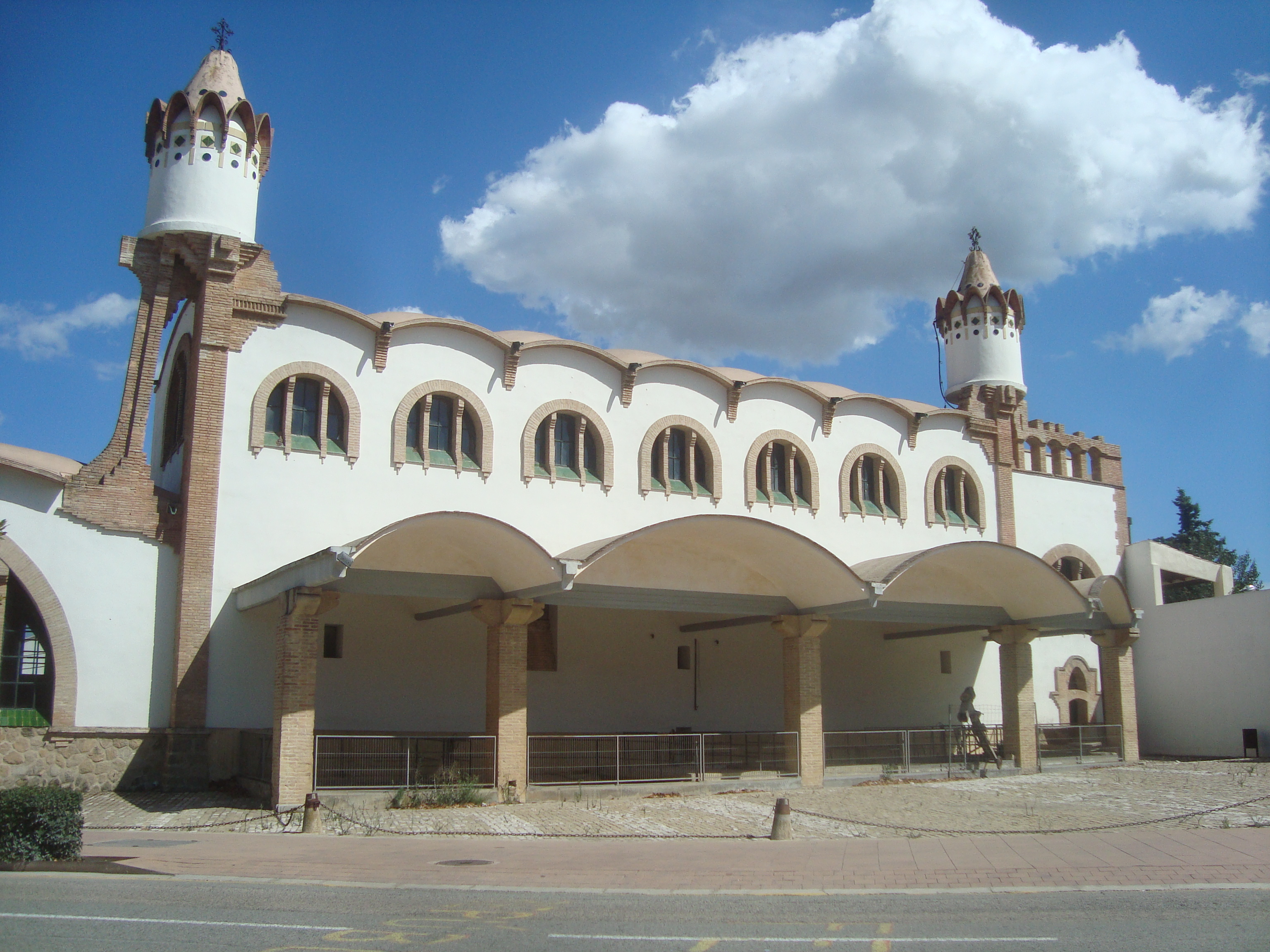 Celler Cooperatiu (Gandesa)